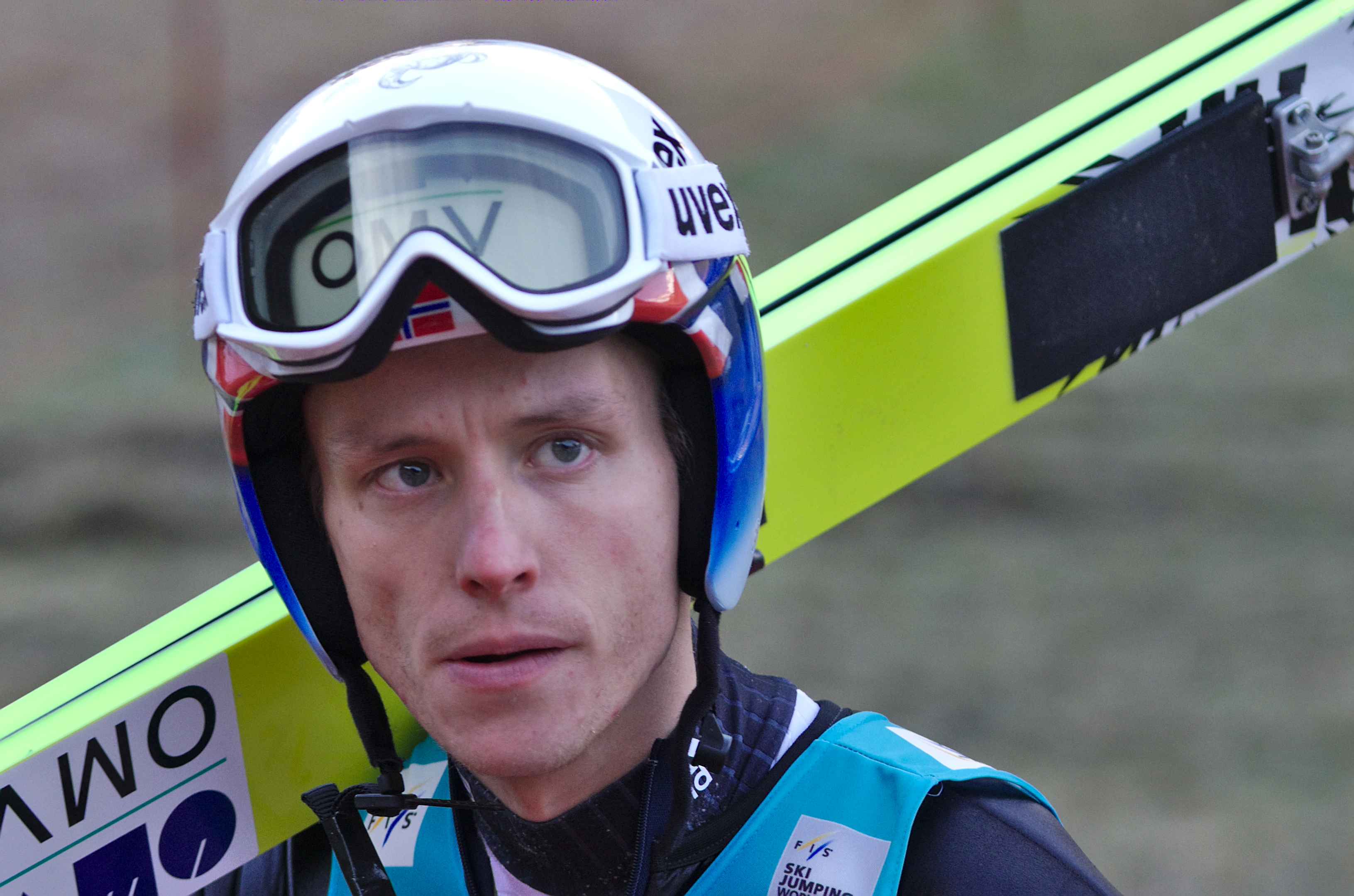 FIS Ski Jumping World Cup 2014 - Engelberg - 20141221 - Rune Velta